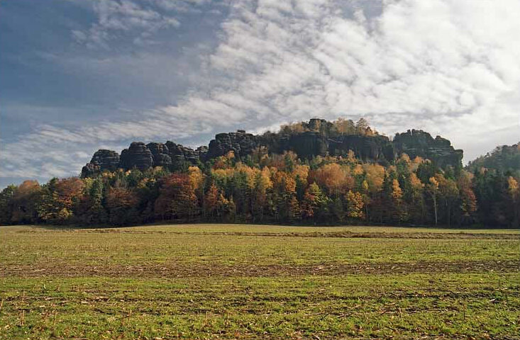 Česky: Stolová hora Pfaffenstein Autor Zp.